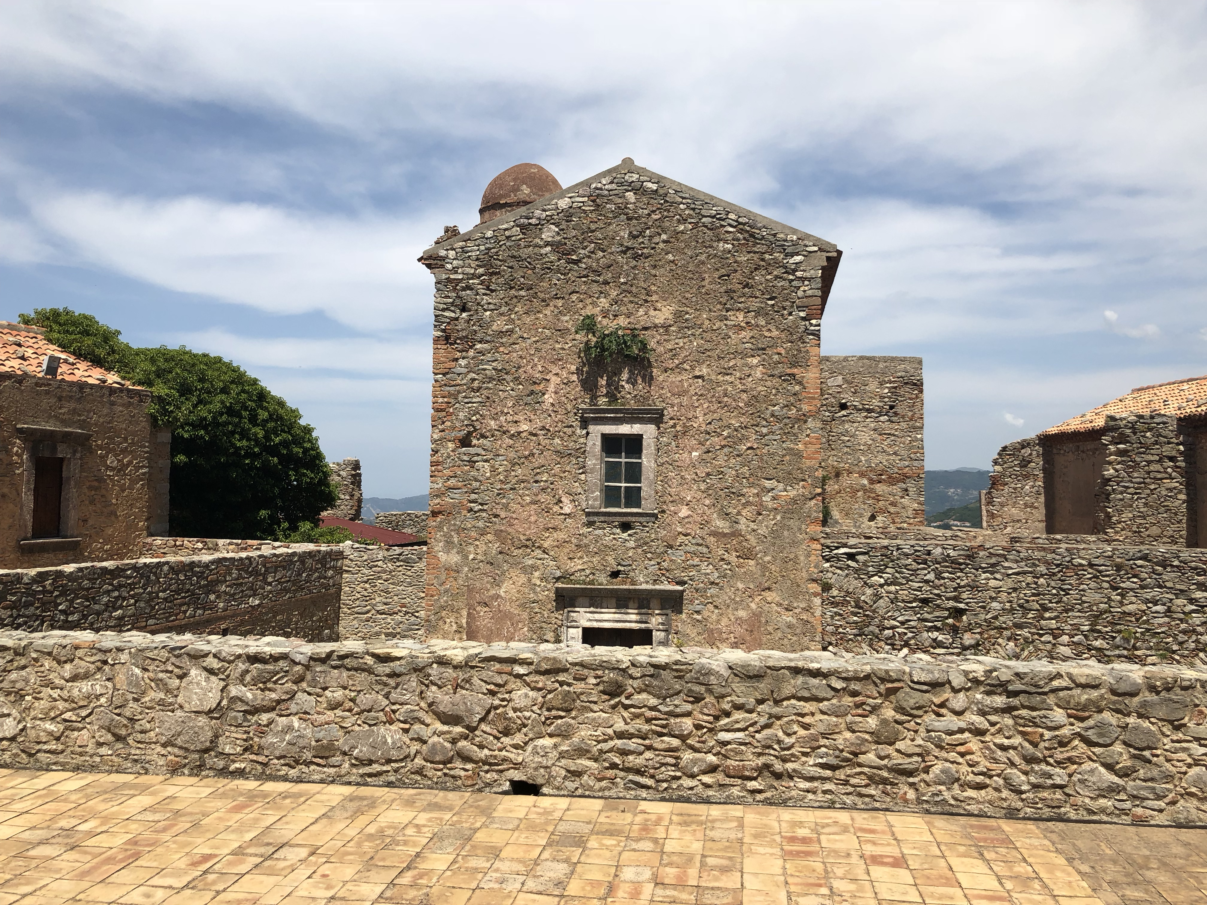 Convento di San Filippo di Fragalà